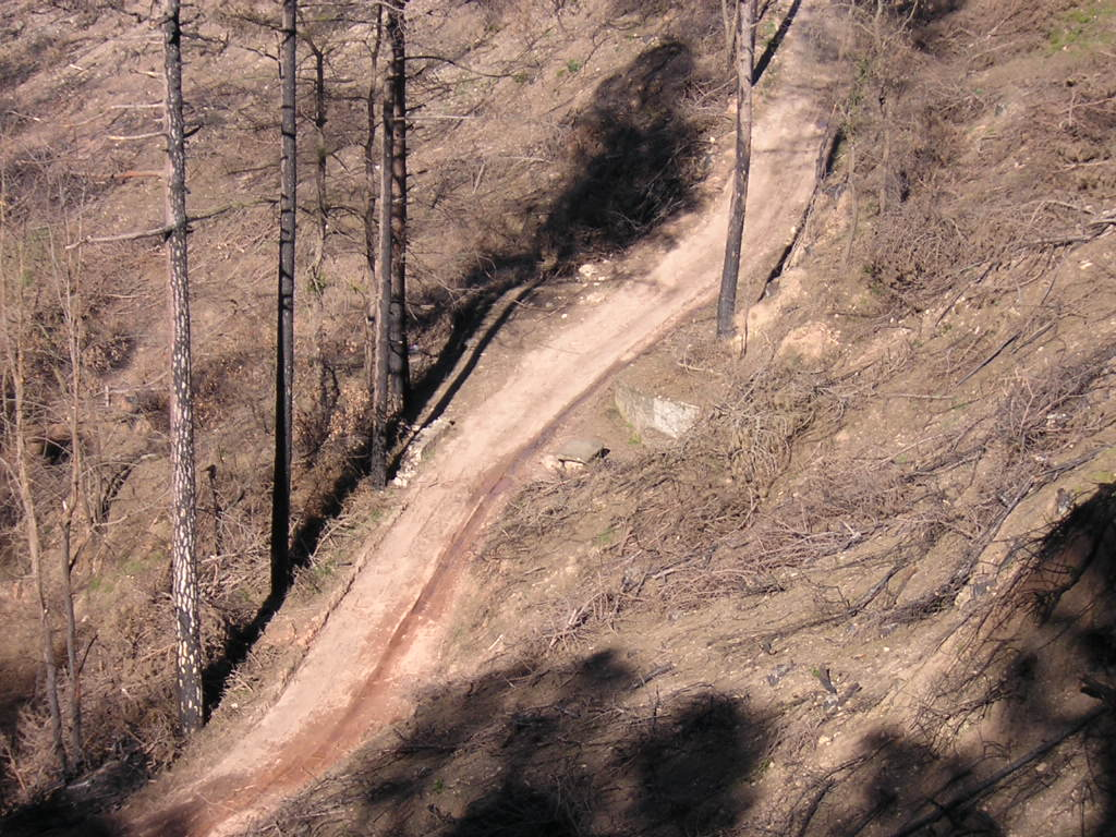 La Font de les Tres Pinasses, des de dalt del Puig del Rossinyol (Monistrol de Calders, Moianès)